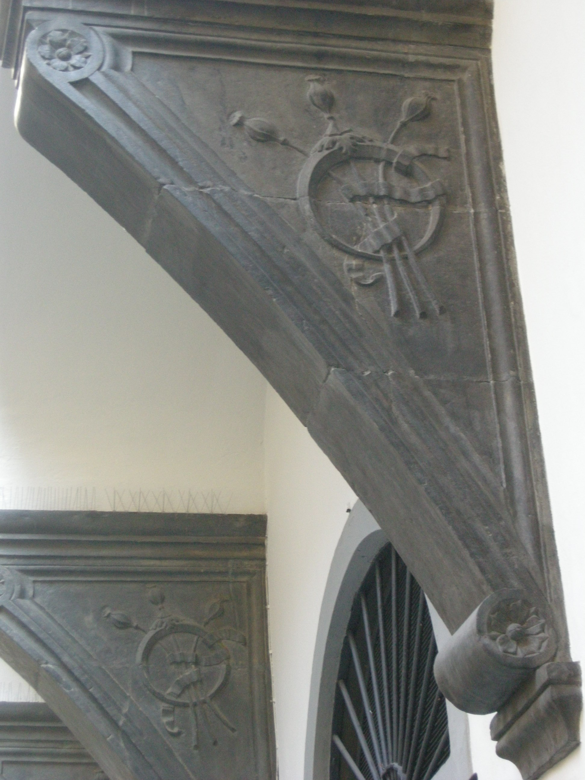 Palazzo Bartolini-Torrigiani, sporti con eblema bartolini